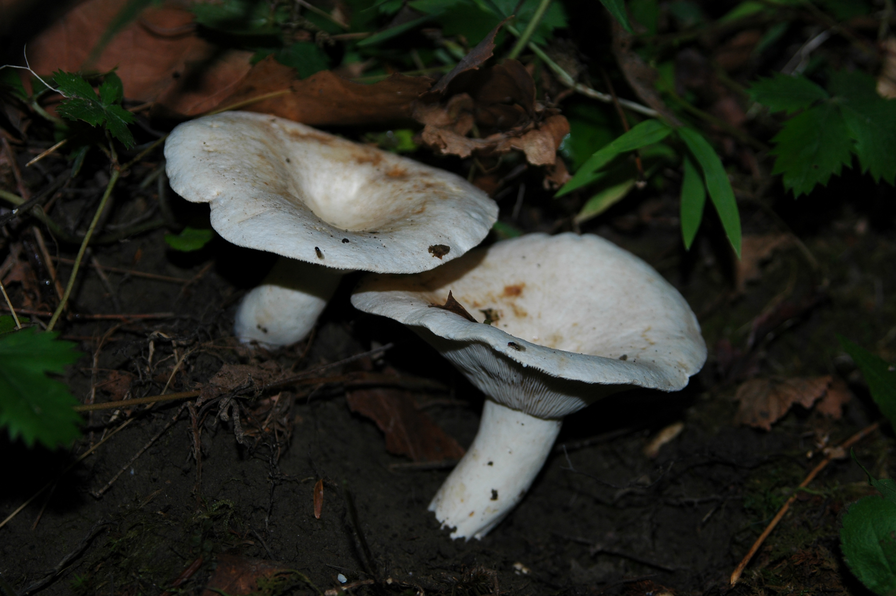 Lactarius piperatus group